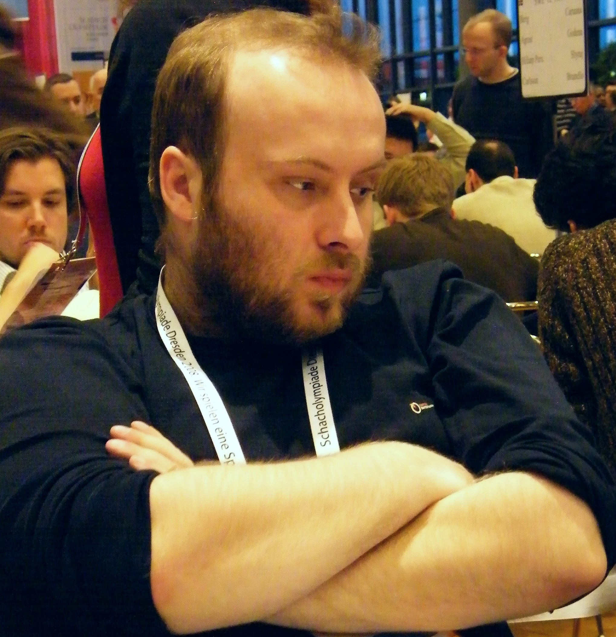 Ibro Saric bei der 38. Schacholympiade in Dresden 2008